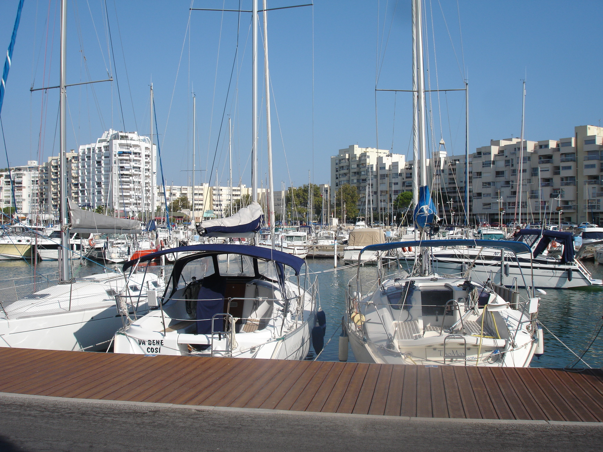 Vue du port de Carnon-Mauguio (Hérault)